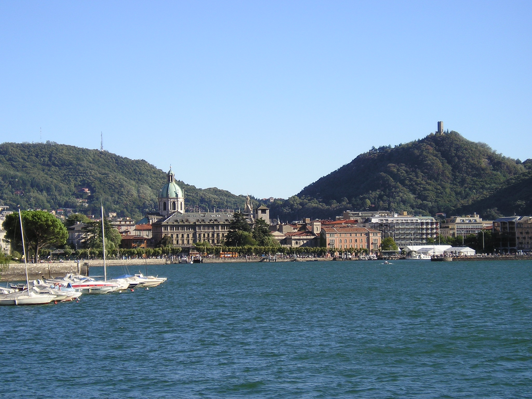 Città di Como ripresa a fine estate 2003, autore Massimo Macconi